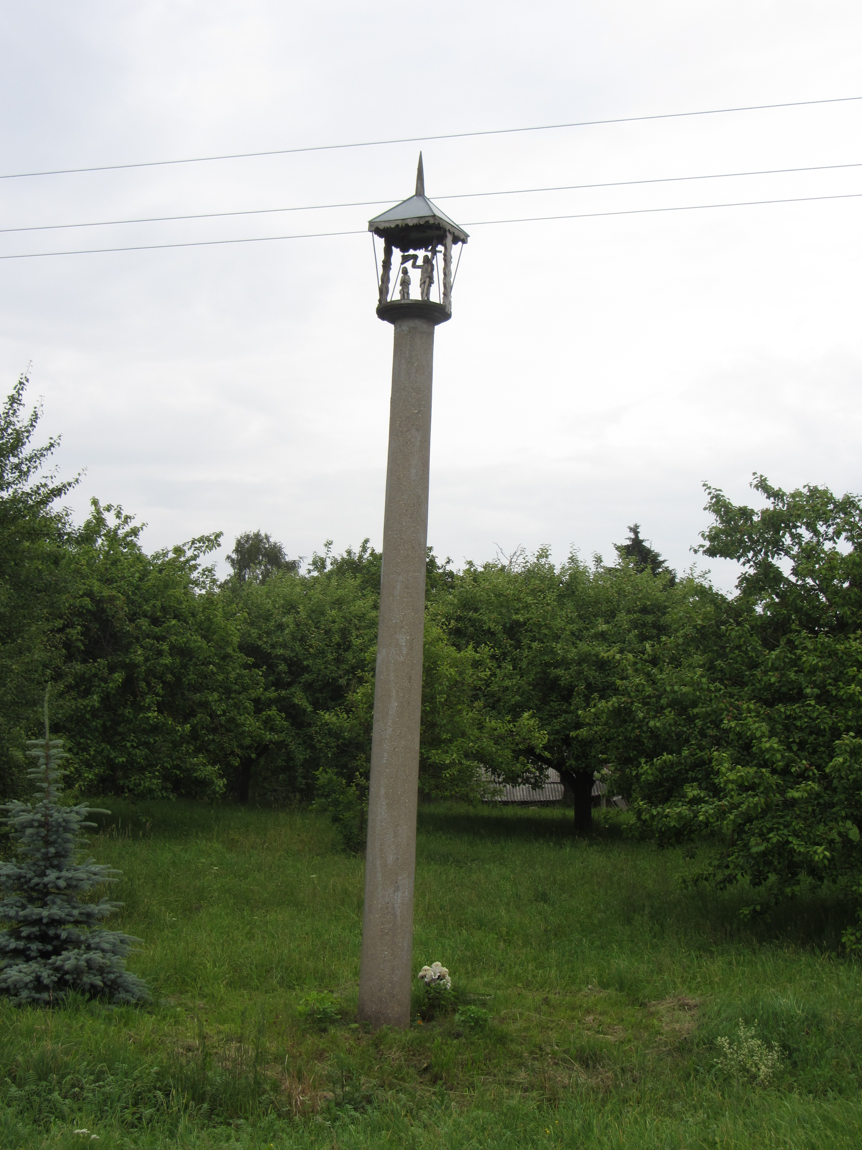 Tauragnų sen., Lithuania